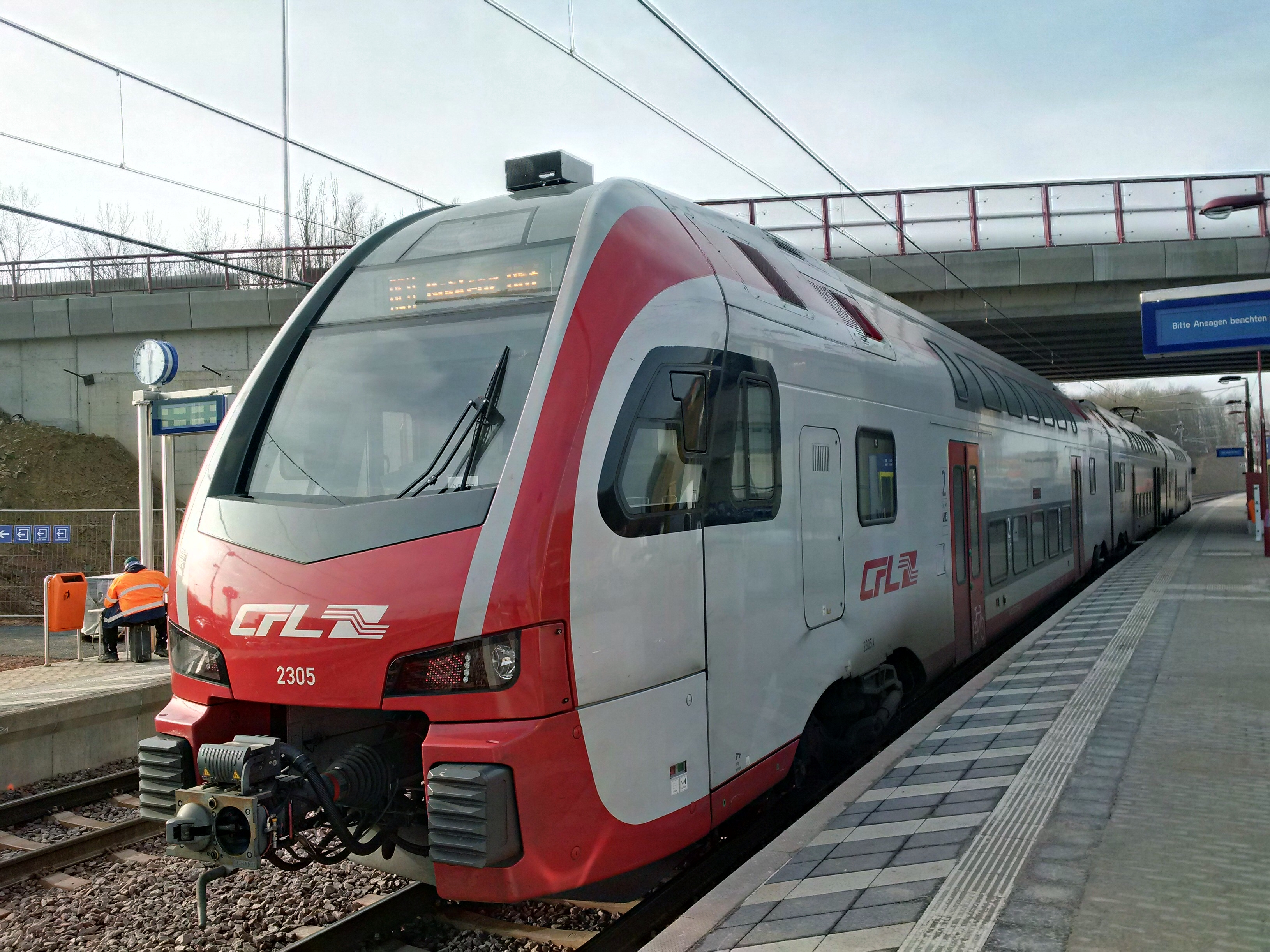 Un train a l'arrêt à la halte CFL de "Sandweiler-Contern". Vue en direction de l'ouest.